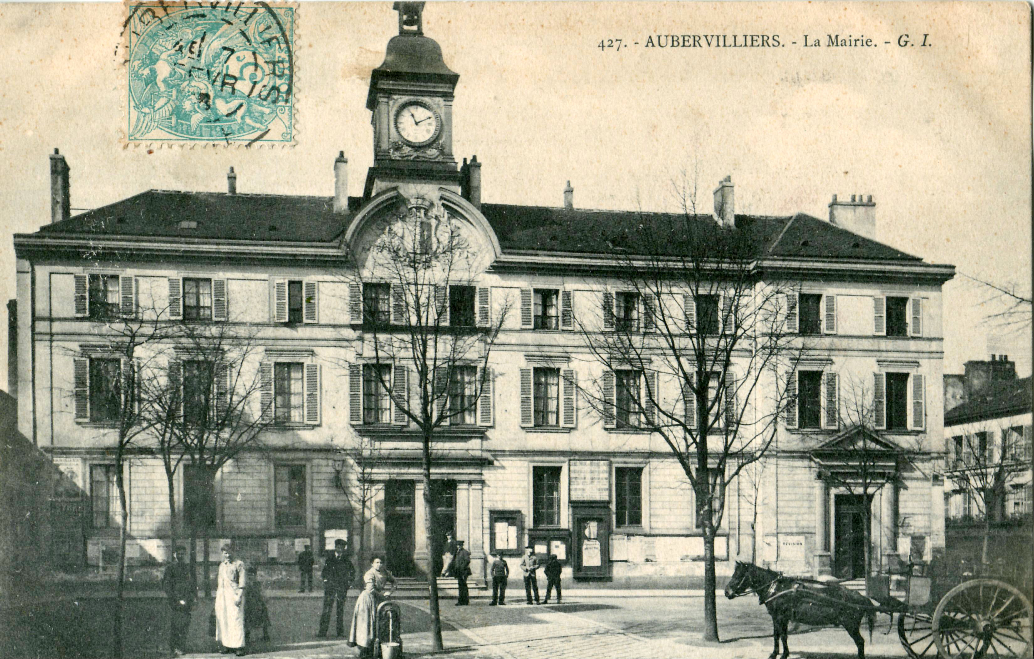 Carte postale ancienne éditée par GI, n°427 : AUBERVILLIERS - La Mairie